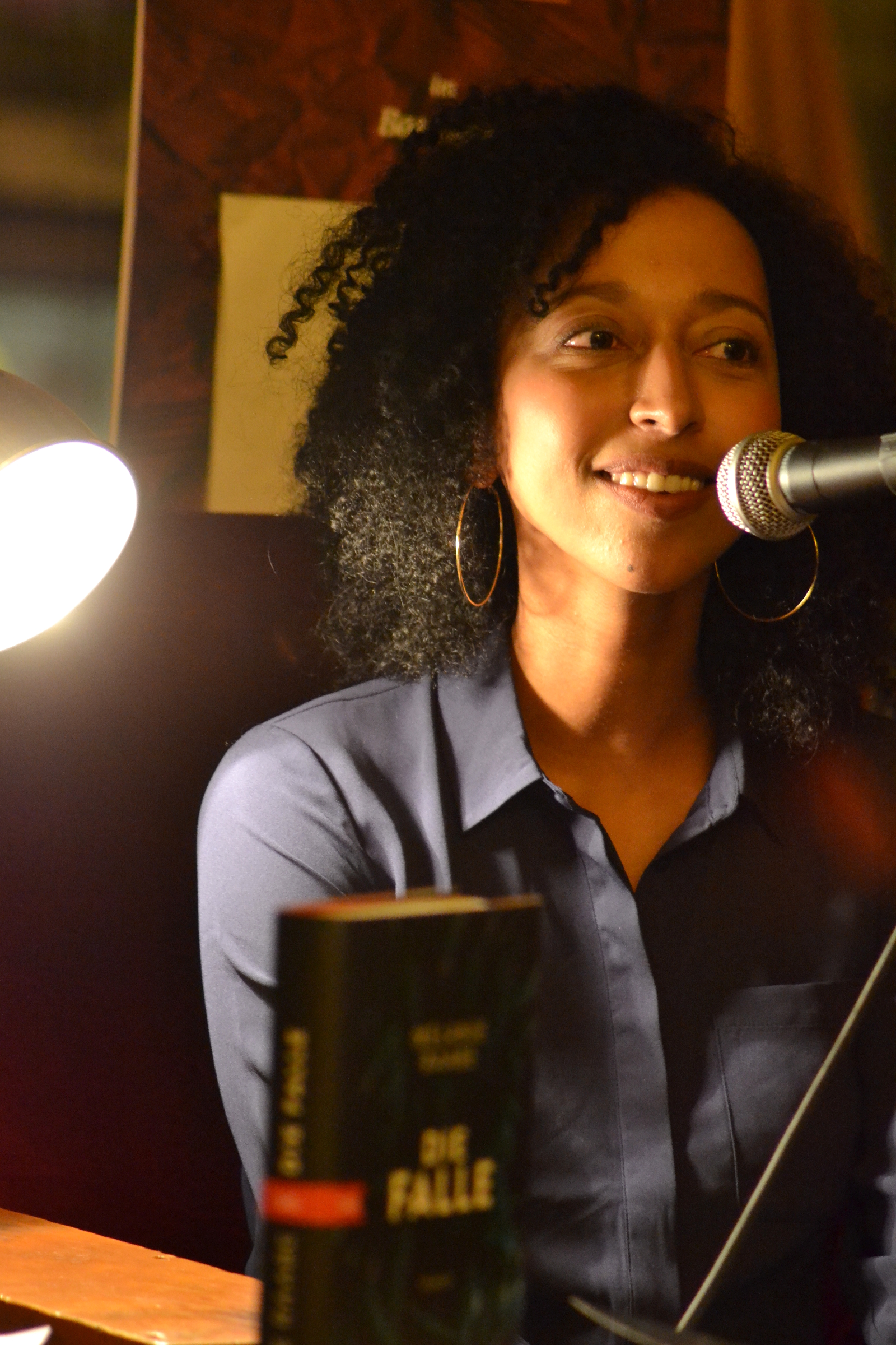 Premierenlesung von "Die Falle" am 3.3.2015 in Köln